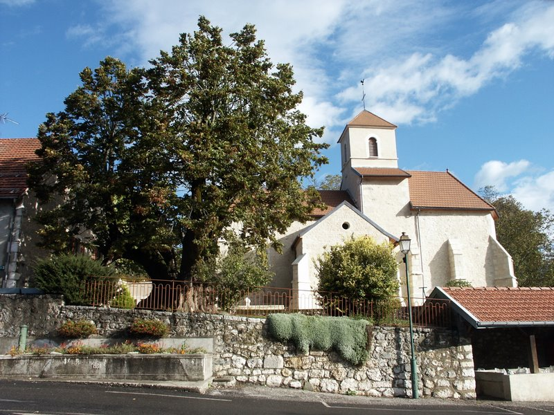 Eglise de Villes